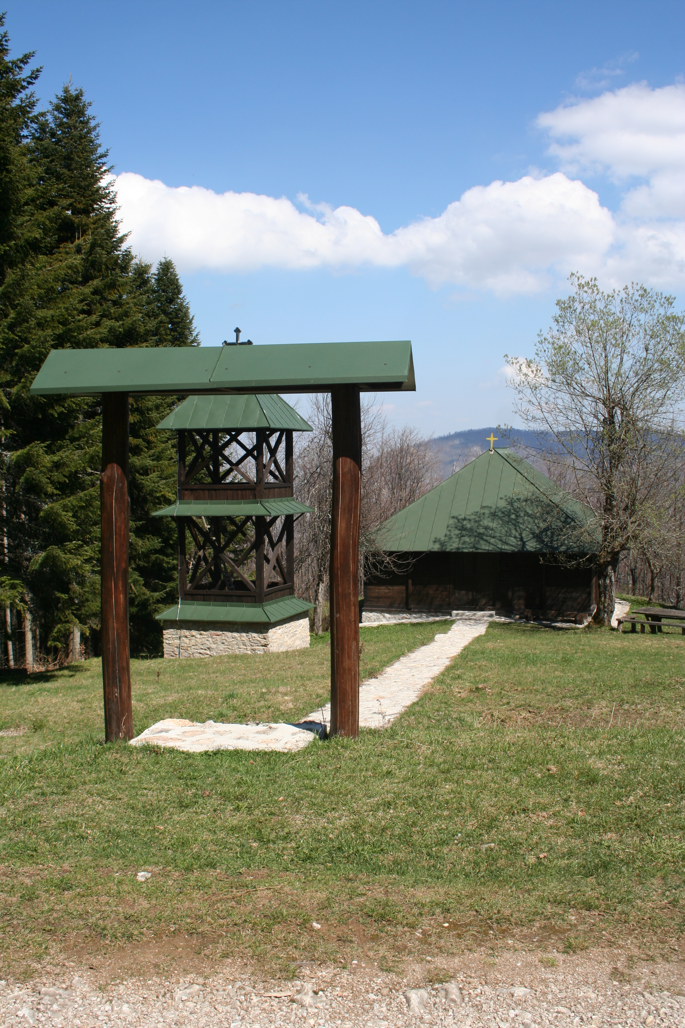 Crkva brvnara na Bobiji